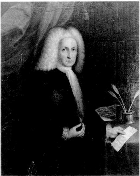 Luis de Salazar y Castro (1658-1734).